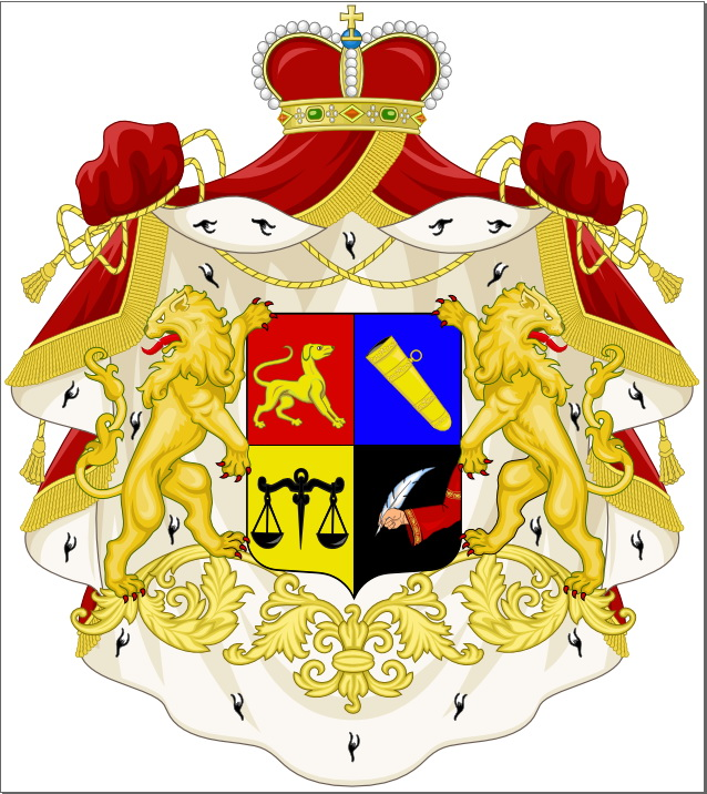 герб рода князей Туманишвили 1-й вариант